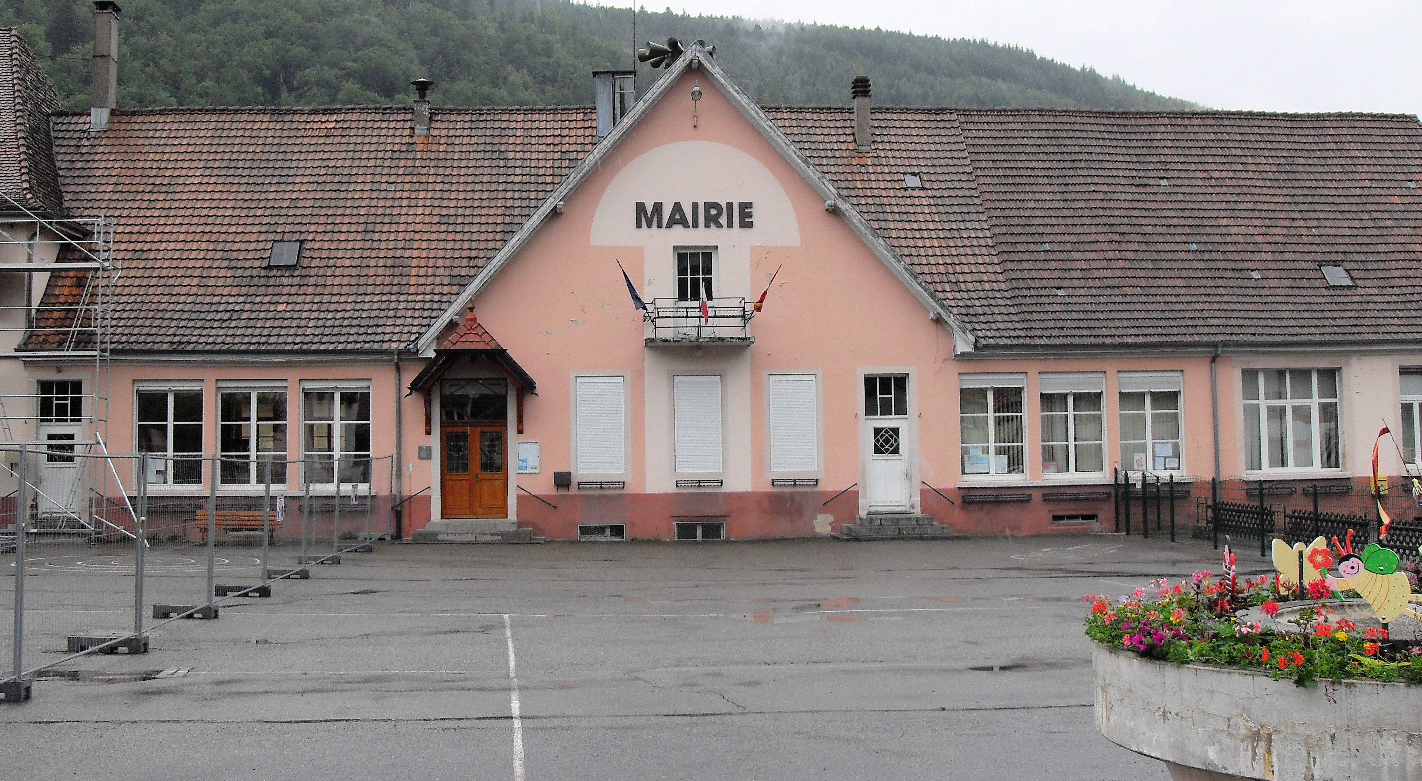 La mairie d'Urbès